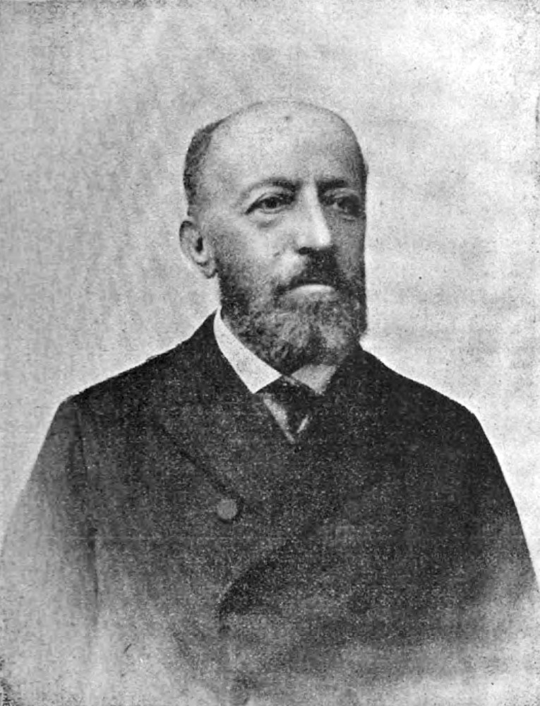 Ritratto di Cesare Paoli